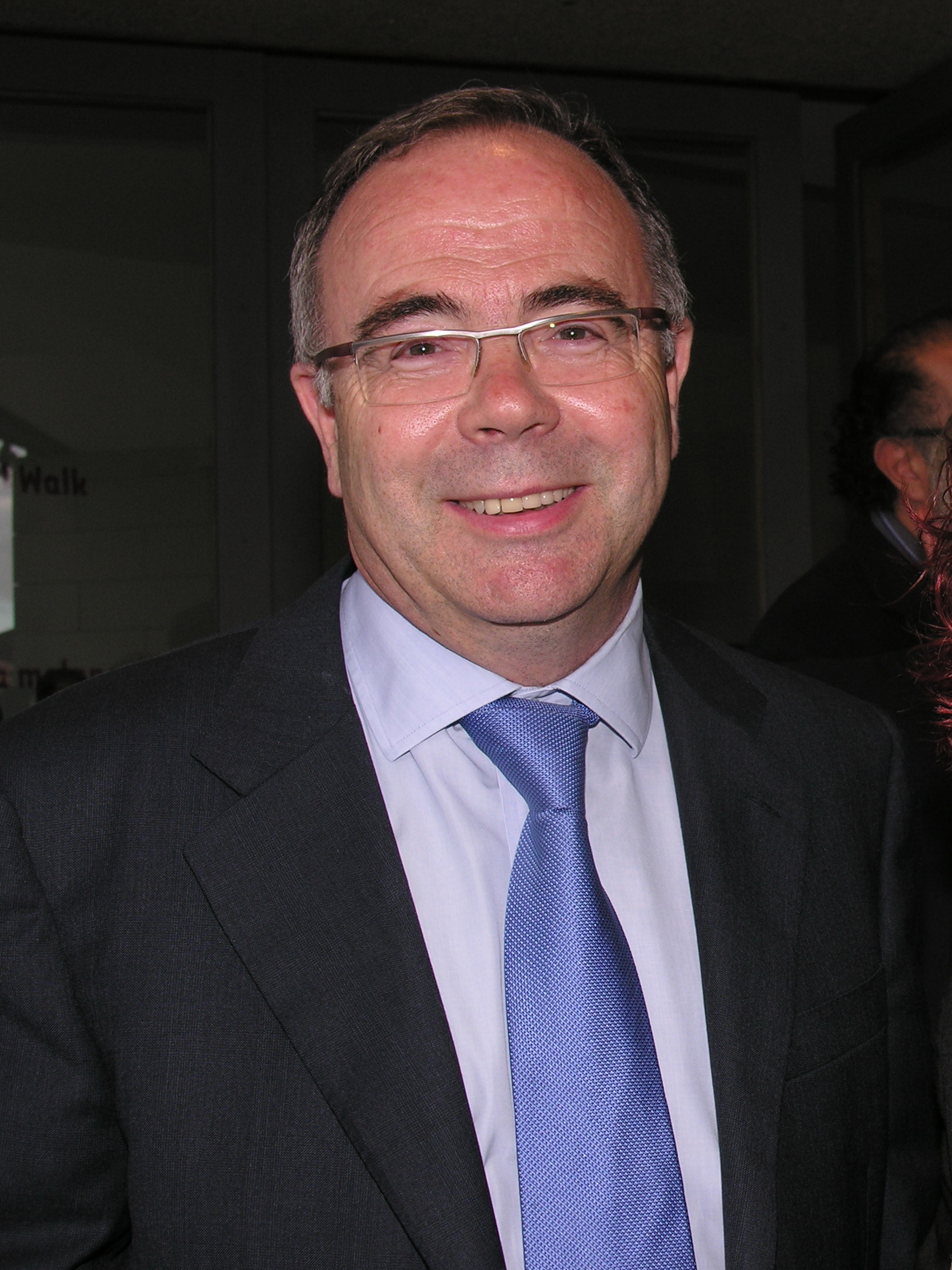 Xosé Antonio Sánchez Bugallo, nado o 31 de xaneiro de 1954 en Teixeiro (Curtis), é un político galego, actualmente alcalde de Santiago